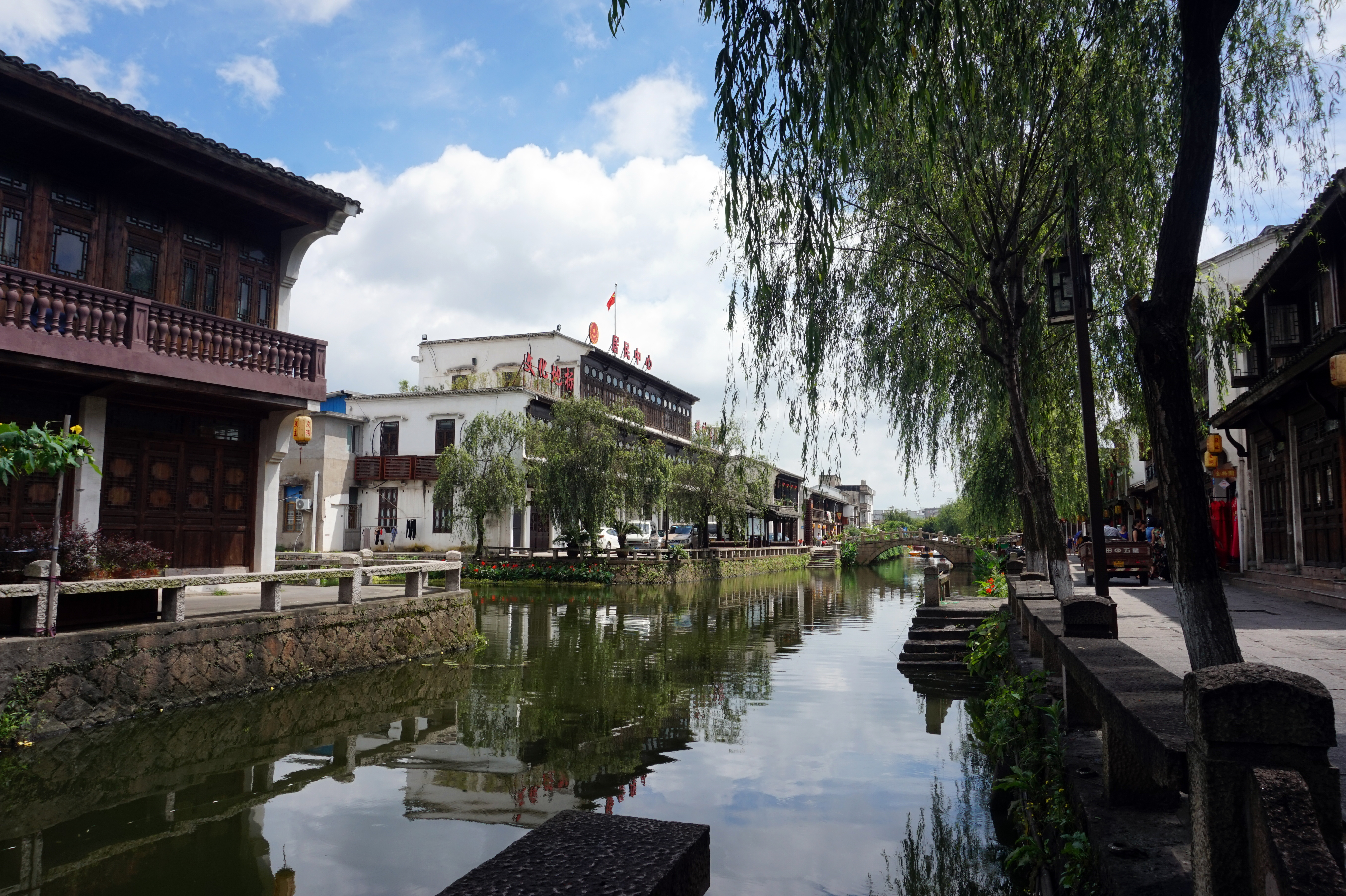 温州永昌堡。